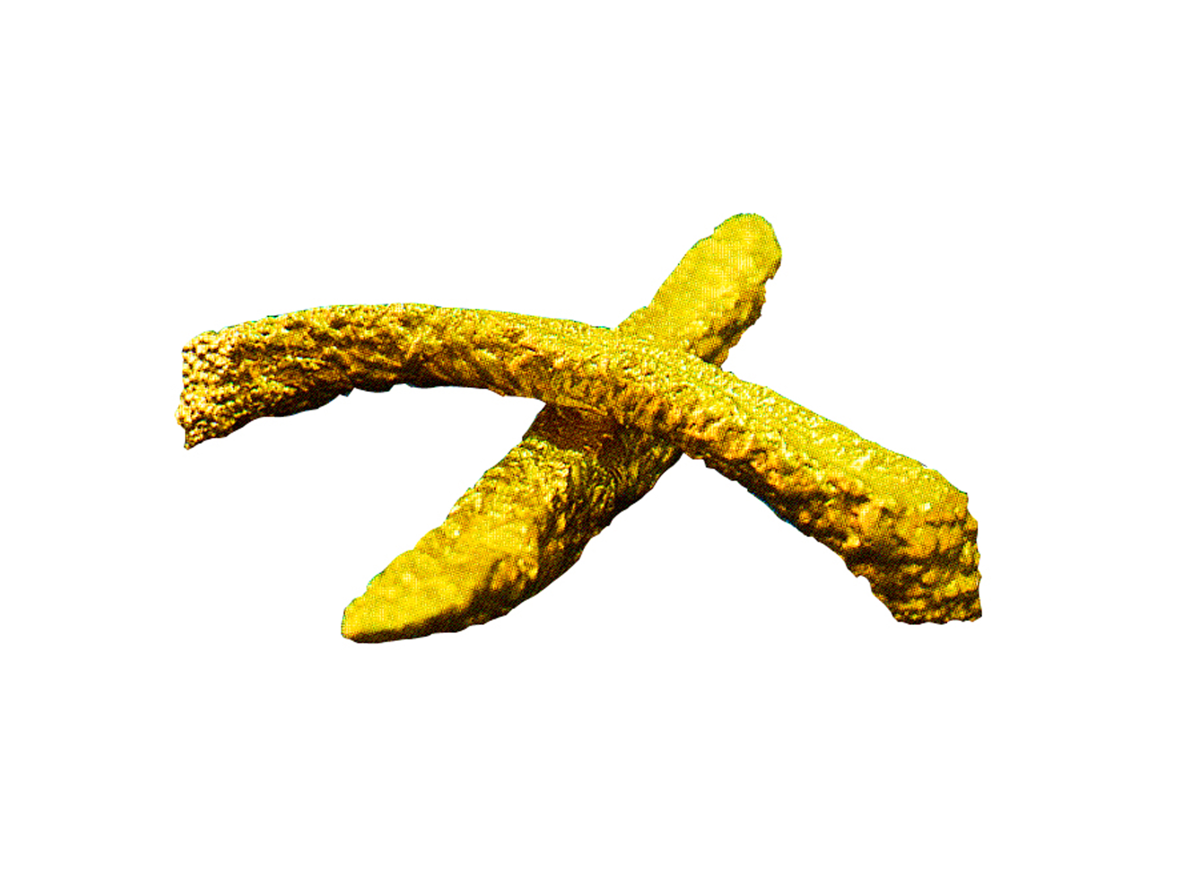 Golden french fries cross (24 carat), 1990